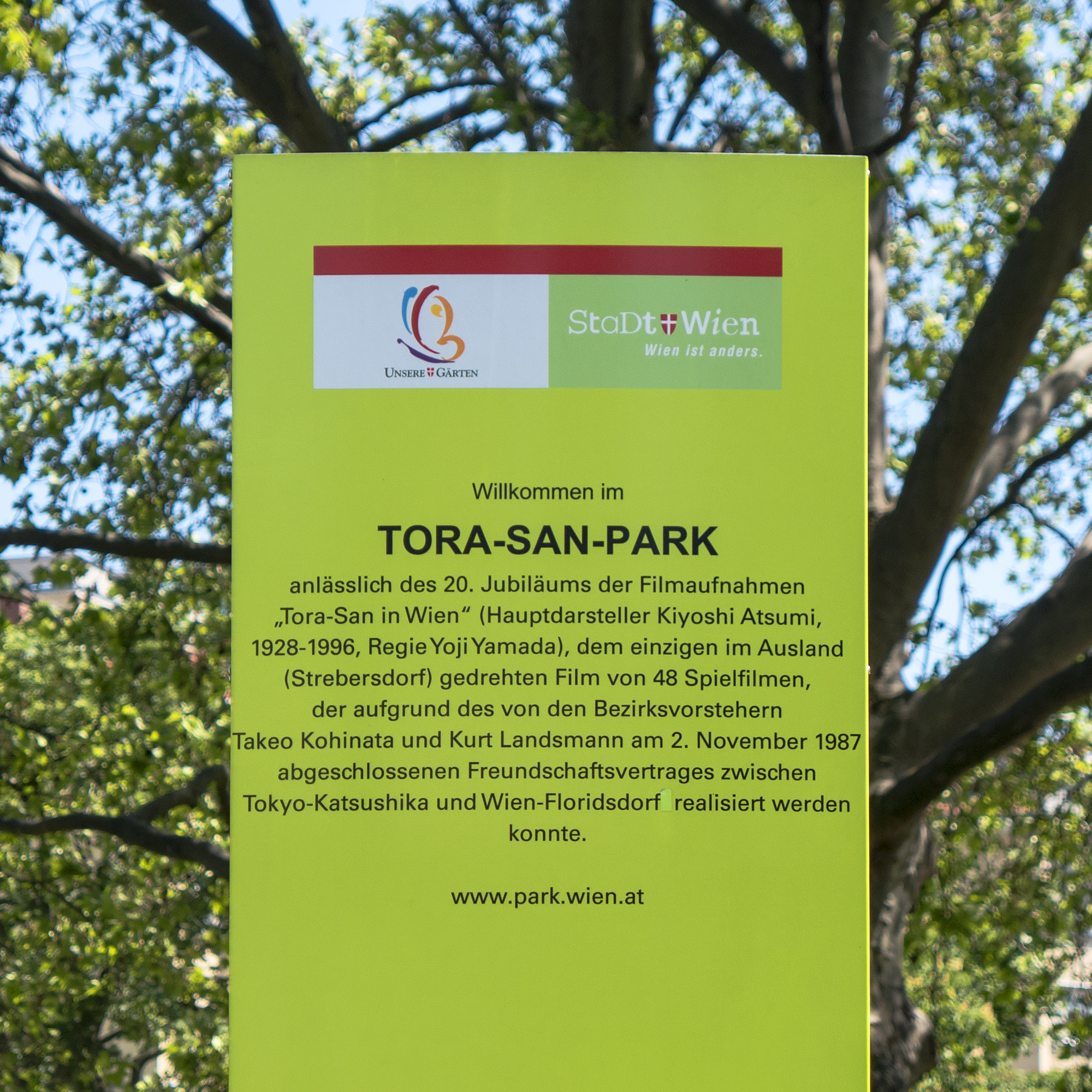 Tora-San-Park in Wien 21